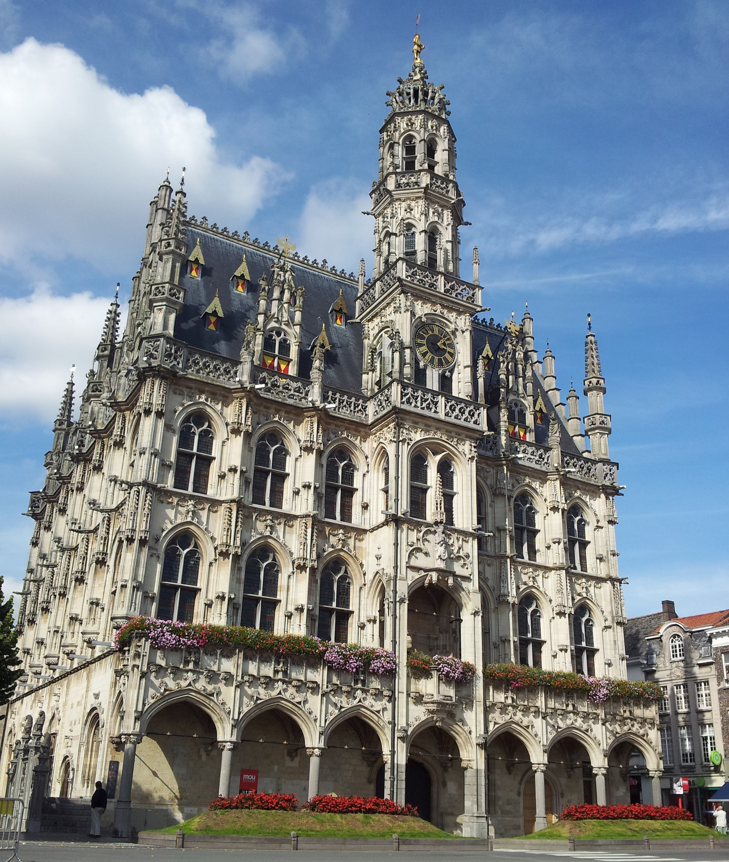 Stadhuis van Oudenaarde